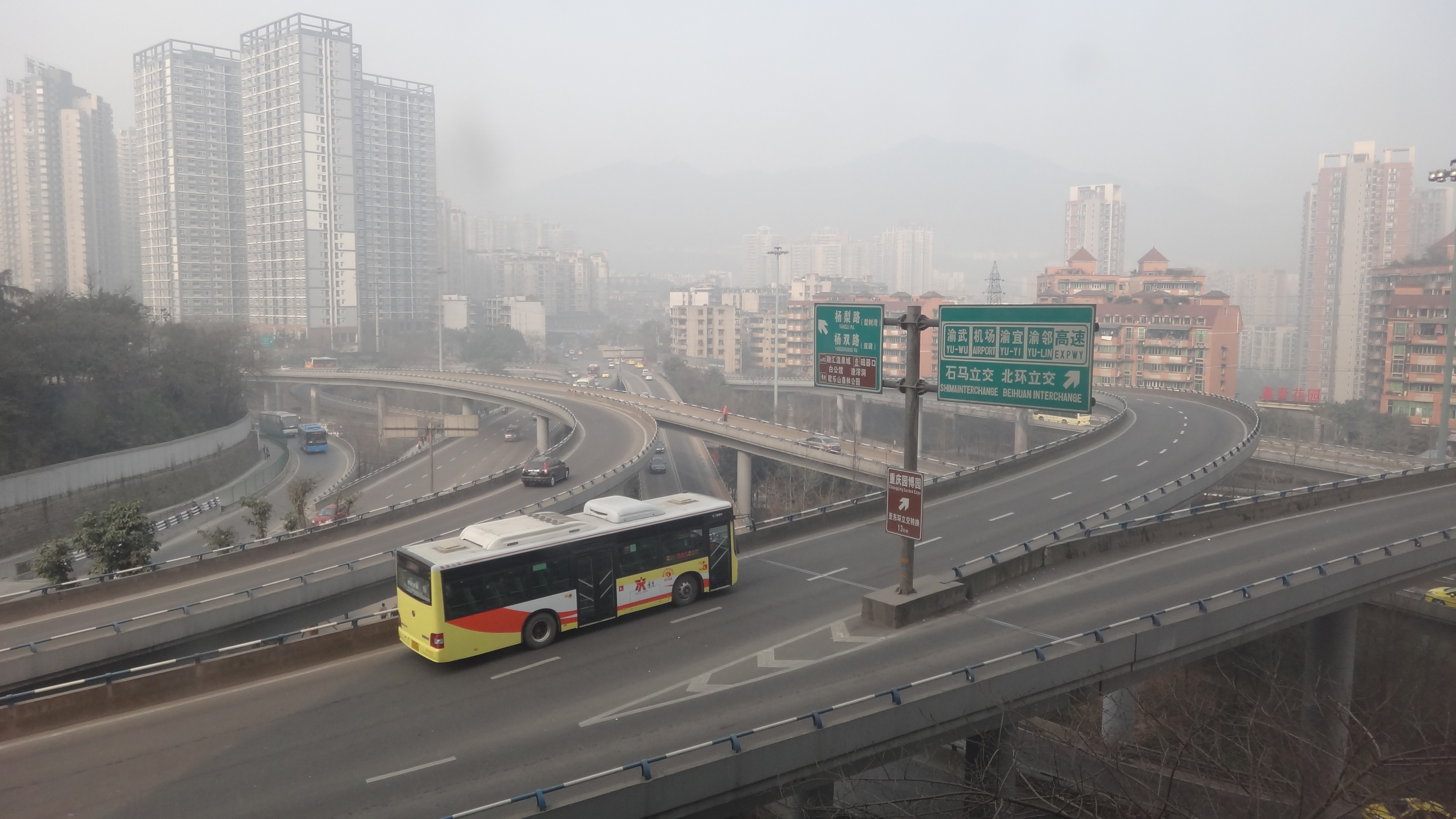 杨公桥立交作为沟通沙坪坝区的重要枢纽，沟通了渝碚路、沙杨路、内环快速路方向